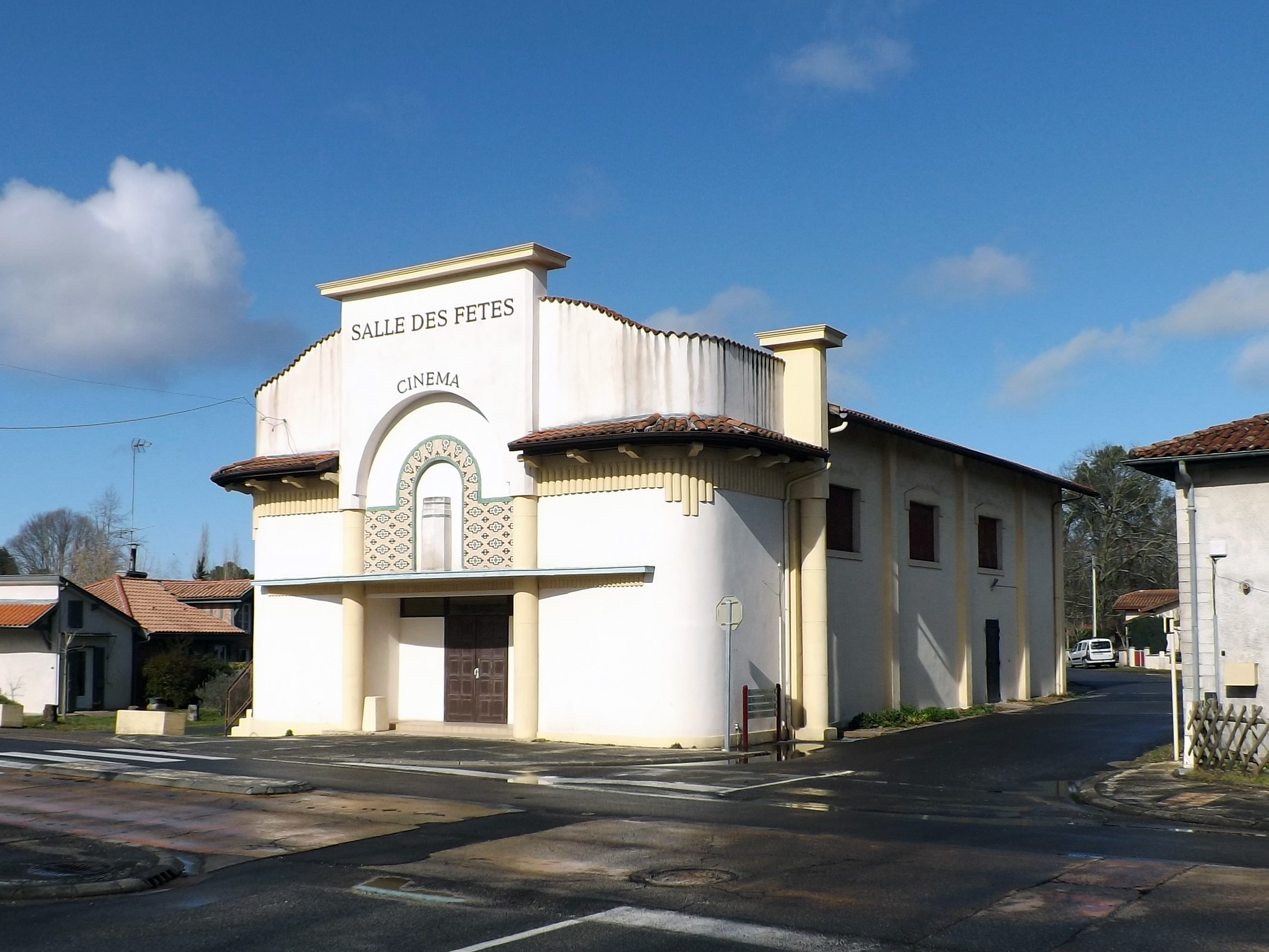 Sala de las hèstas de Linça, Maransin, Gasconha